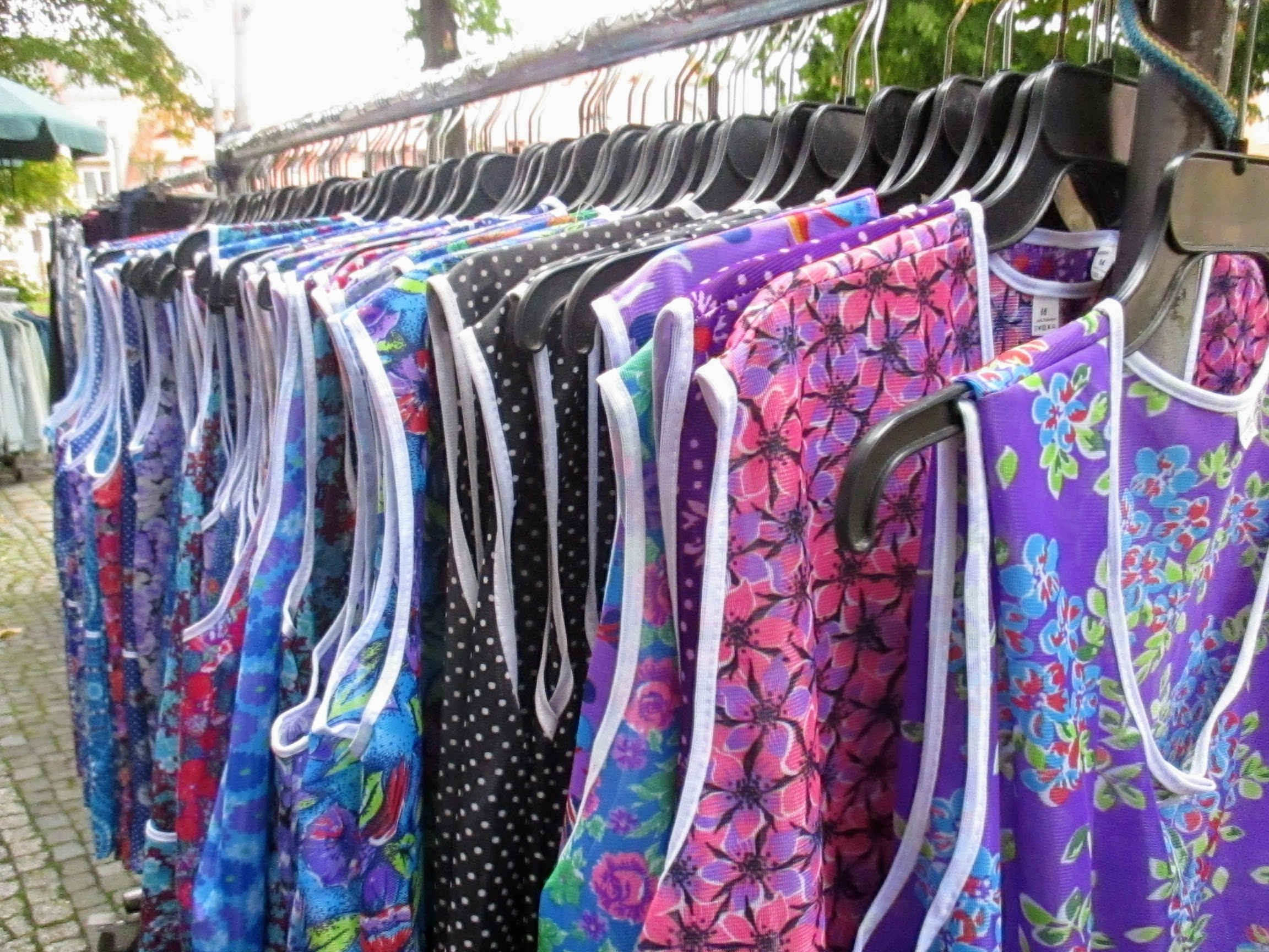 aufgehangene Arbeitskleidung auf einer Kleiderstange